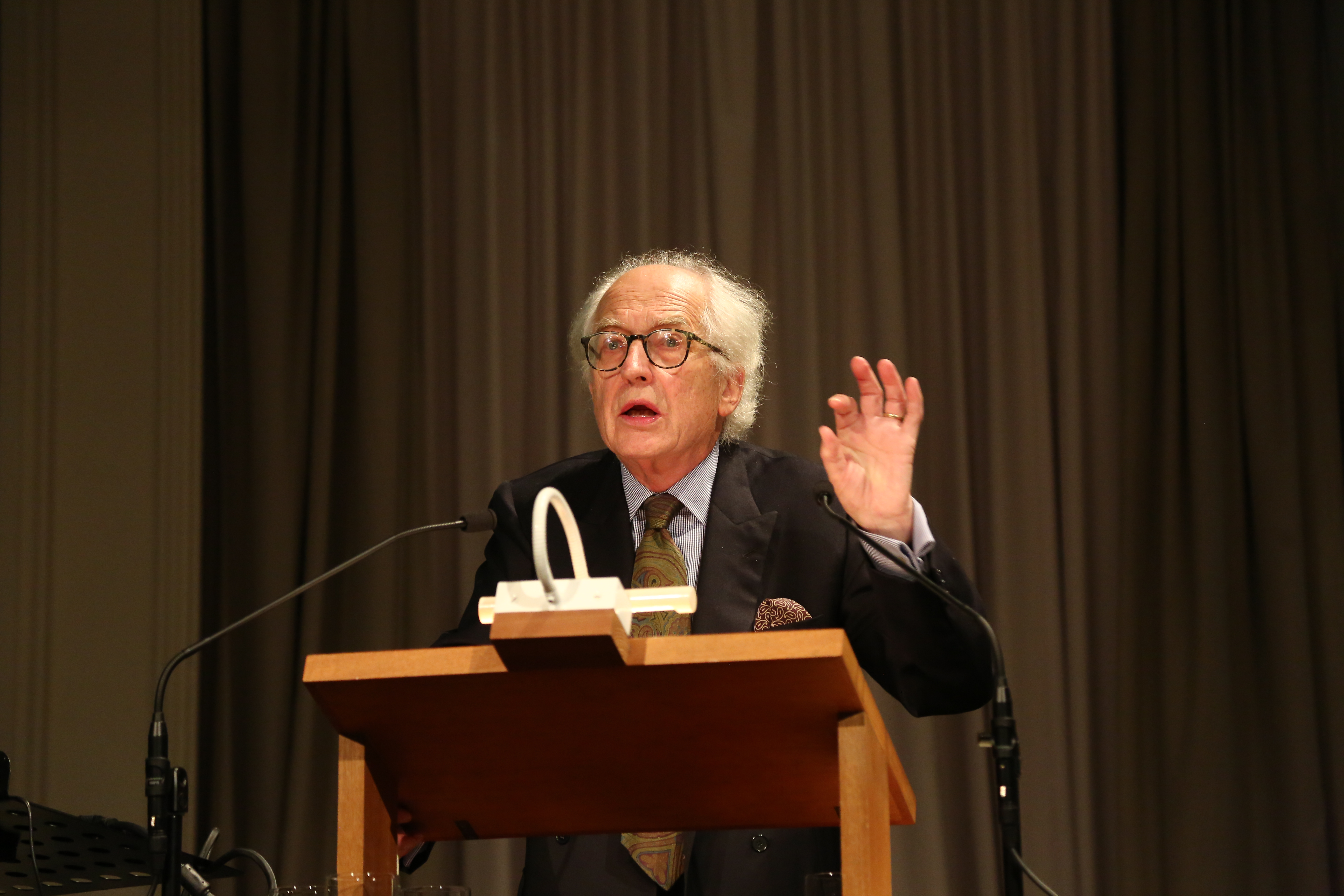 John Dixon Hunt, Professor für die Geschichte der Landschaftsarchitektur an der University of Pennsylvania Verleihung des Sckell-Ehrenrings durch die Bayerische Akademie der Schönen Künste an John Dixon Hunt. 19. Oktober 2017 in der Münchner Residenz.